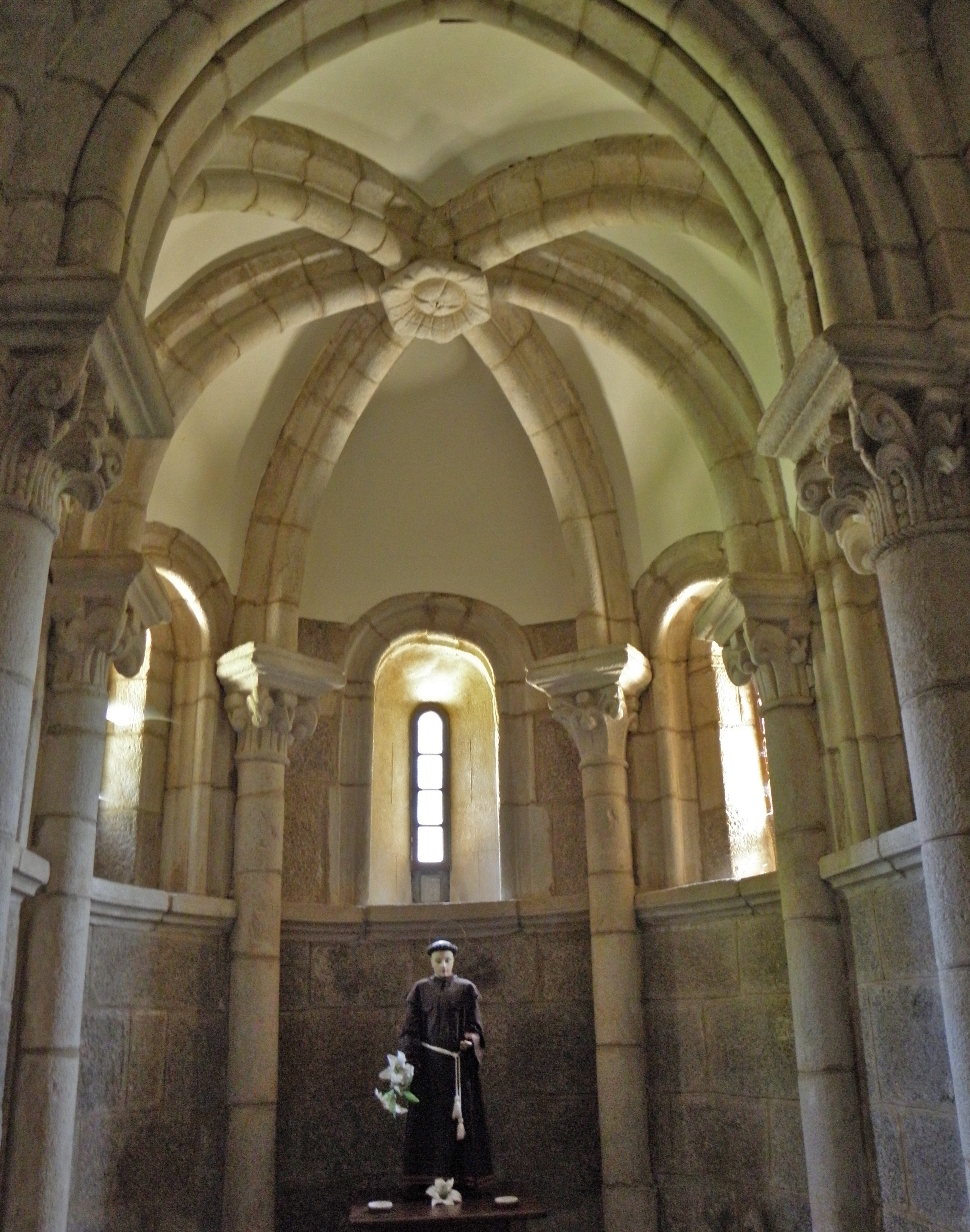 Santa María de Cambre